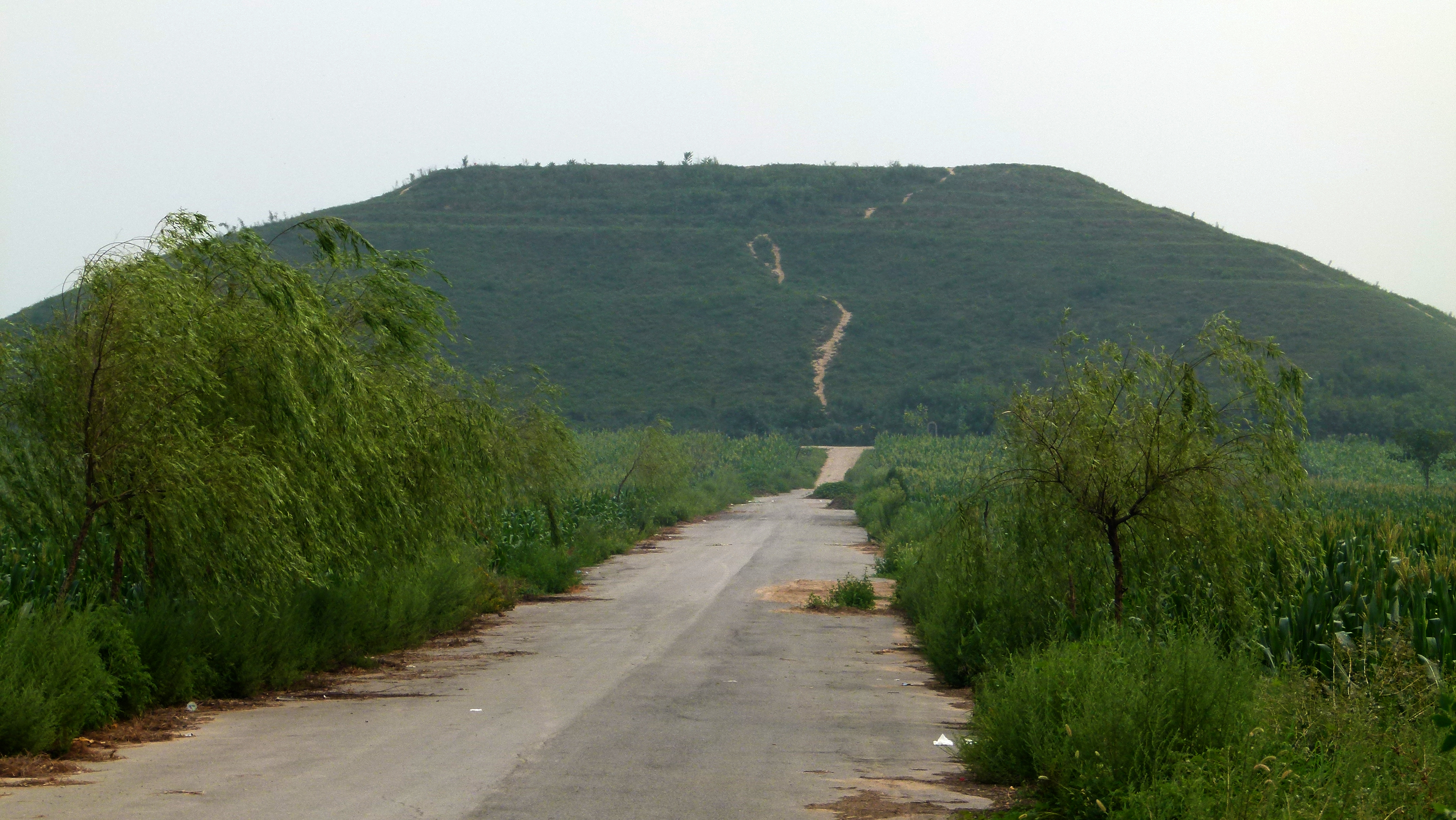 Yiling - Grab des Kaisers